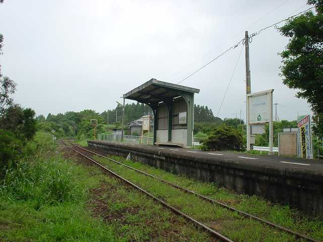 水成川駅（2005年7月投稿者が撮影）